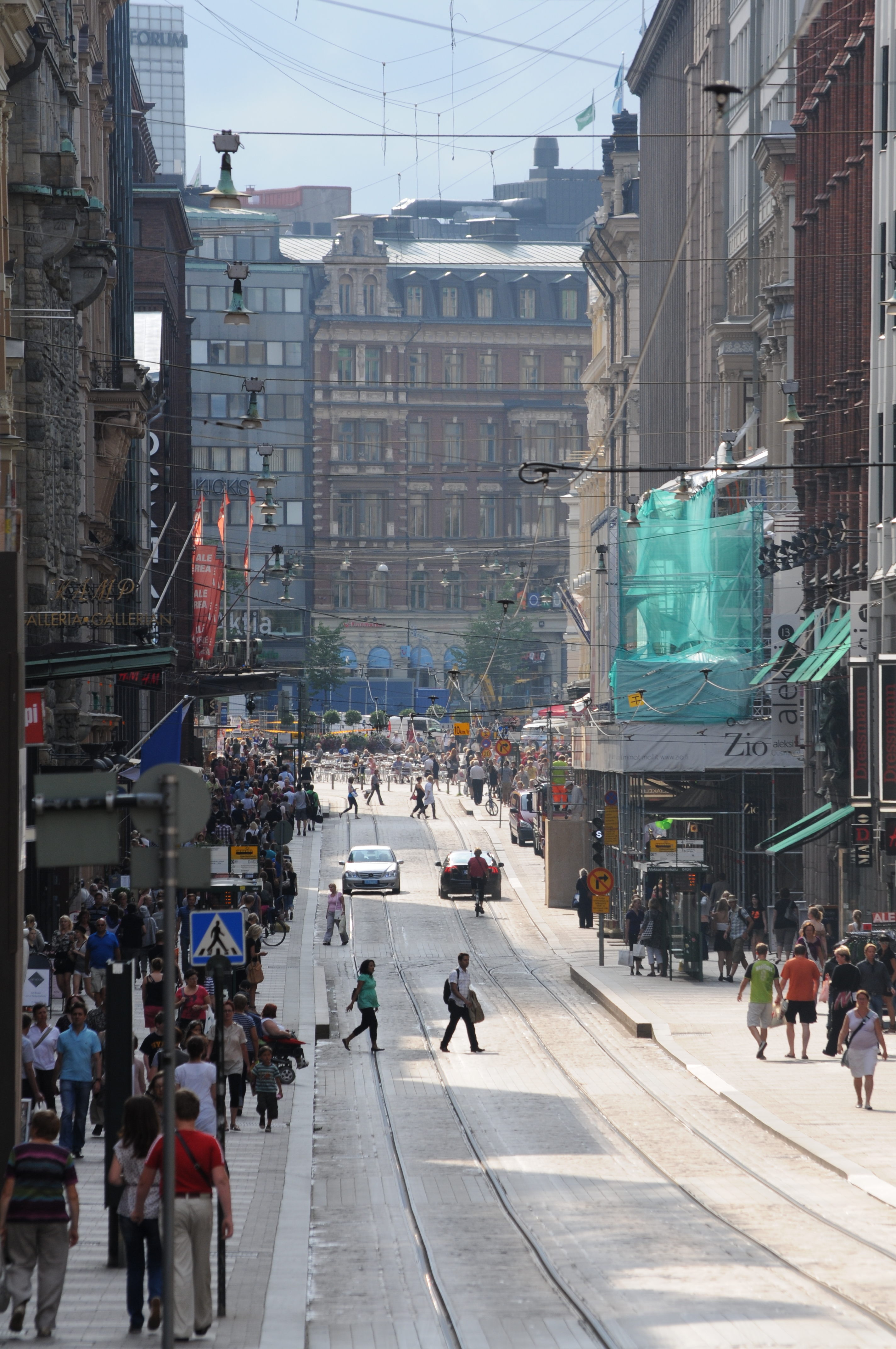 Helsinki